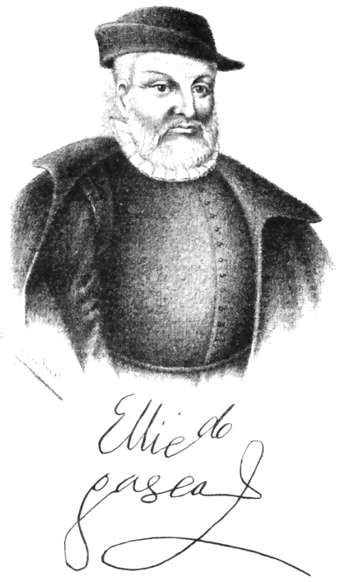 Grabado que representa al Pacificador Don Pedro de La Gasca (1493-1567), tal como lucía en el Perú, con su bonete eclesiástico y su firma